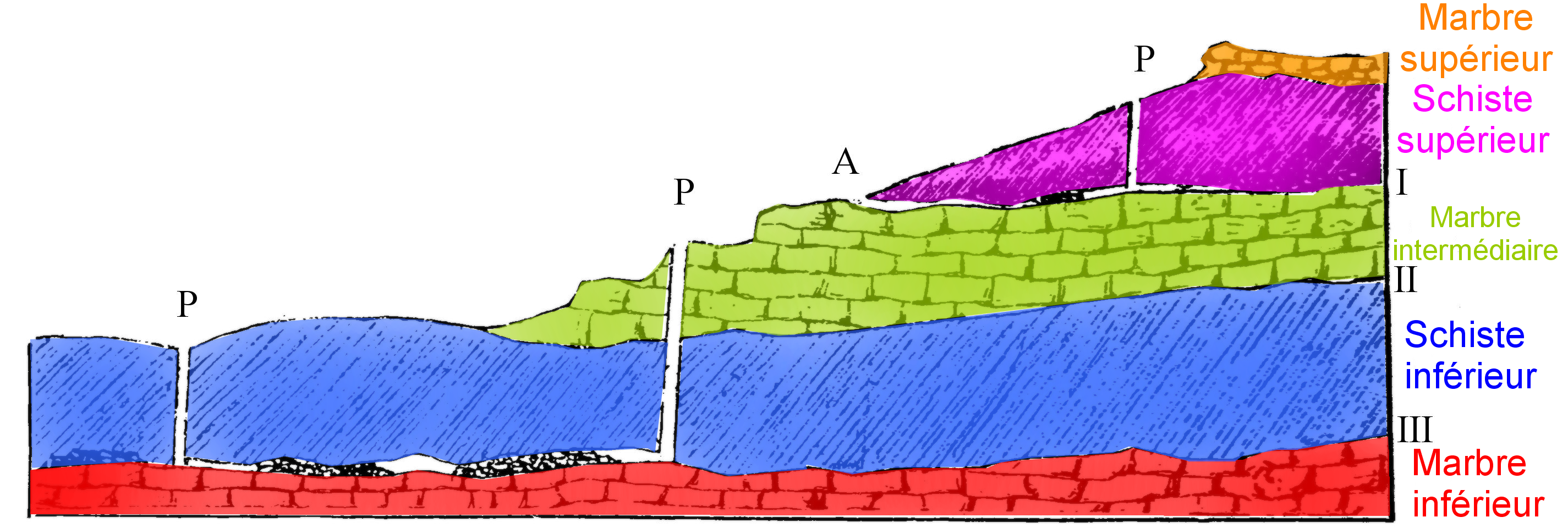 Coupe théorique des terrains du Laurion ; photographie d'une illustration de l'ouvrage libre de droit Edouard Ardaillon Les mines du Laurion dans l'Antiquité, Fontemoing, Paris, 1897, p. 14